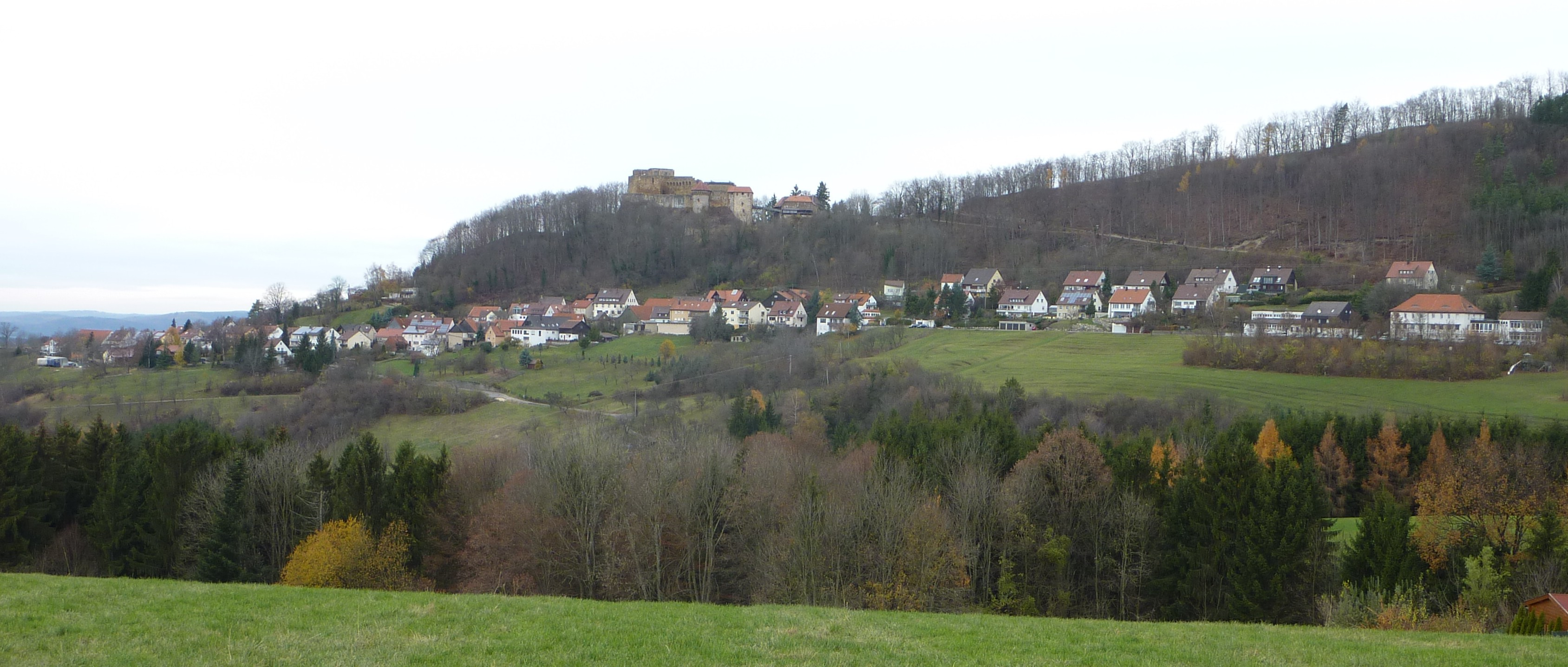 Rechberg, Ortsteil Hinterweiler mit Ruine Hohenrechberg